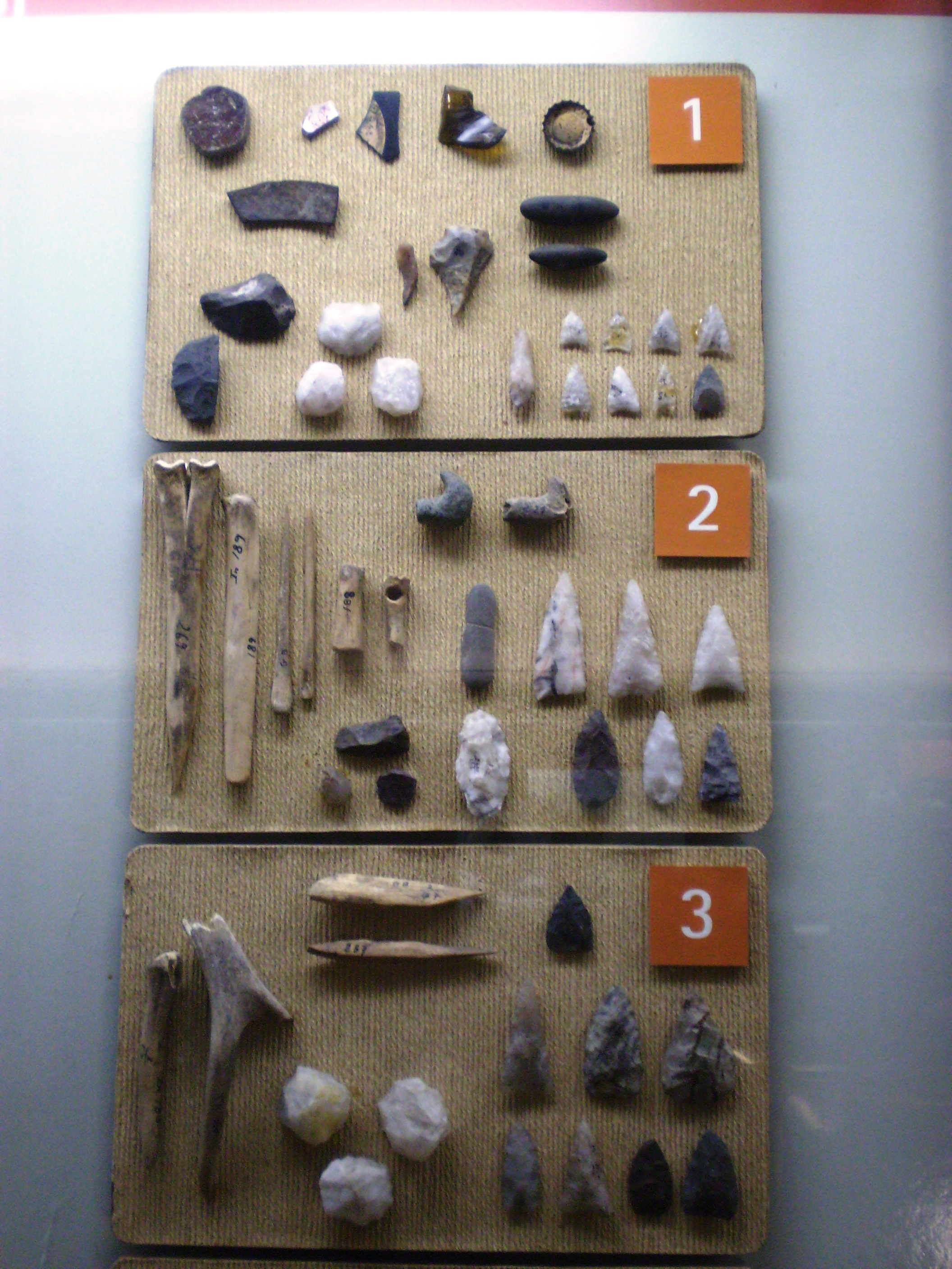 Objetos recolectados de las excavaciones efectuadas en la gruta de Intihuasi, actual provincia de San Luis. Museo de La Plata